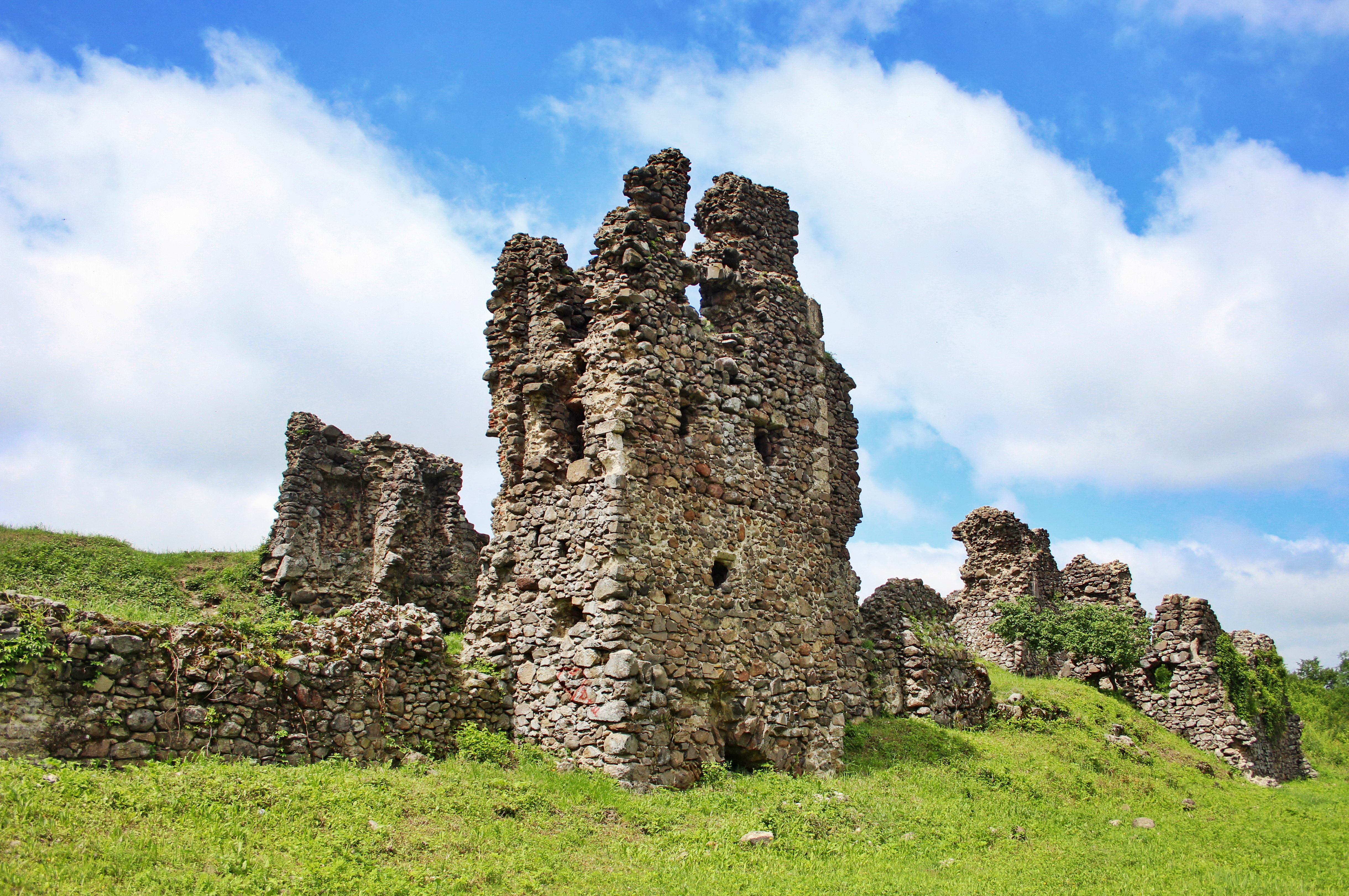 Угочанський замок (руїни) (мур.), Виноградів, вул. Коцюбинського